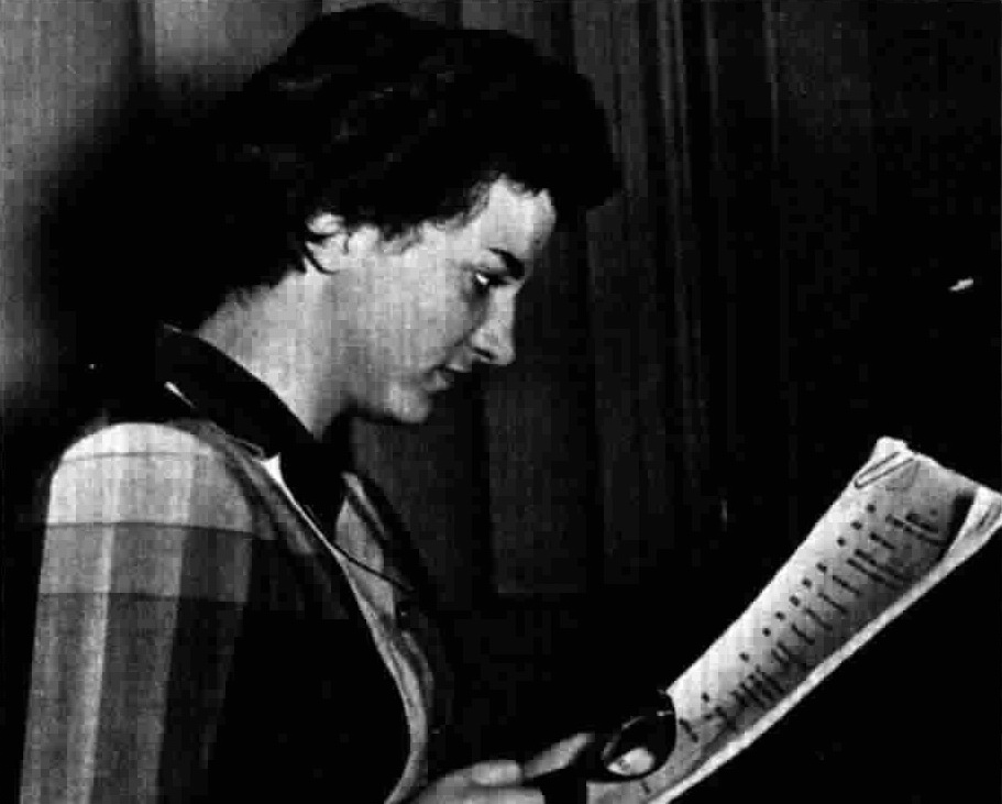 Adriana Innocenti durante una pausa della registrazione di un dramma radiofonico